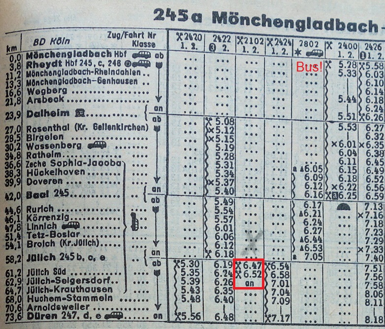 Auszug aus dem DB-Sommerfahrplan 1963 der Strecke 245a Mönchengladbach - Dalheim - Baal - Linnich - Jülich - Düren mit hervorgehobenem Werkstättenzug Jülich - Jülich-Süd